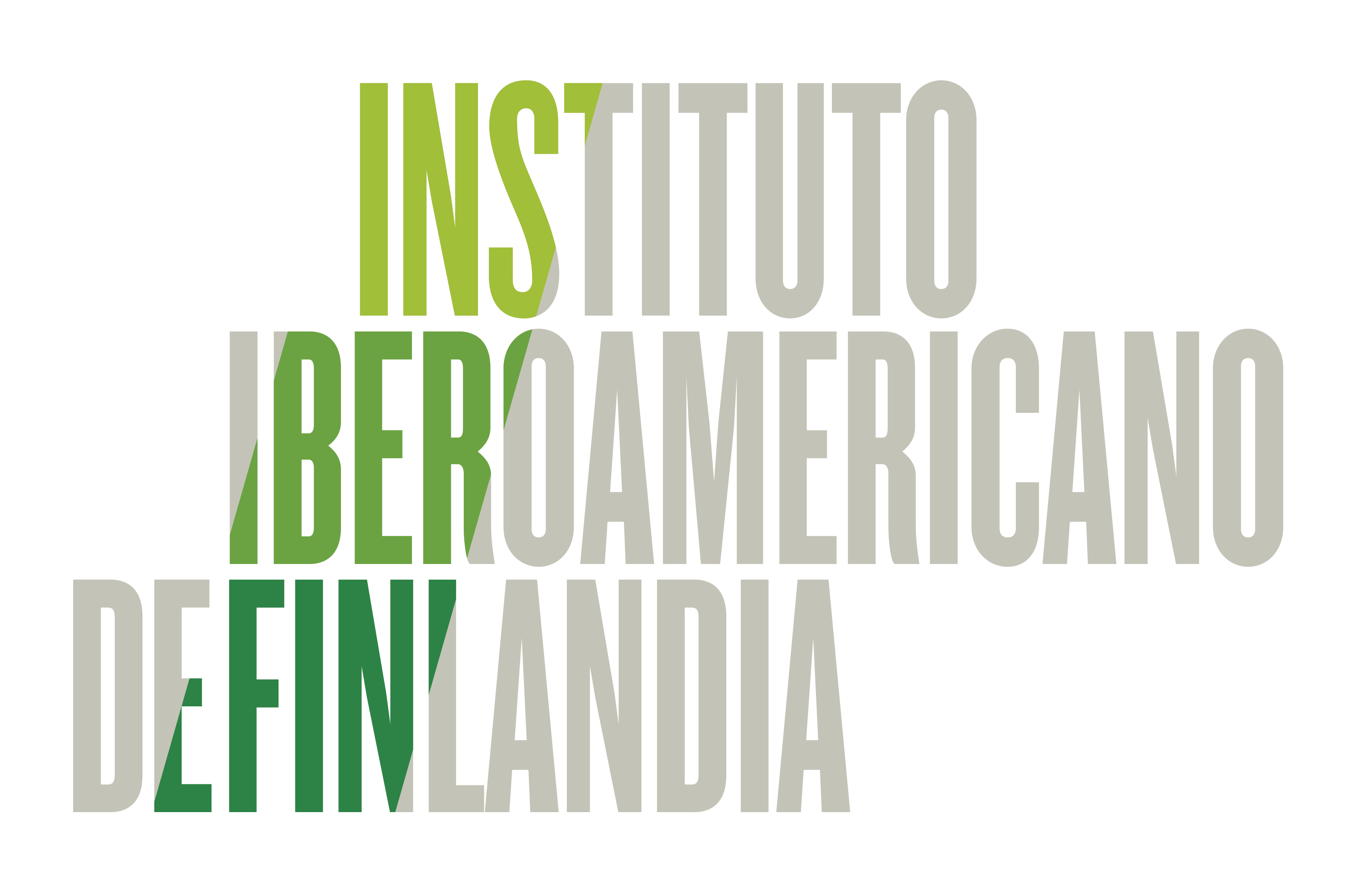 Suomen Madridin-instituutti